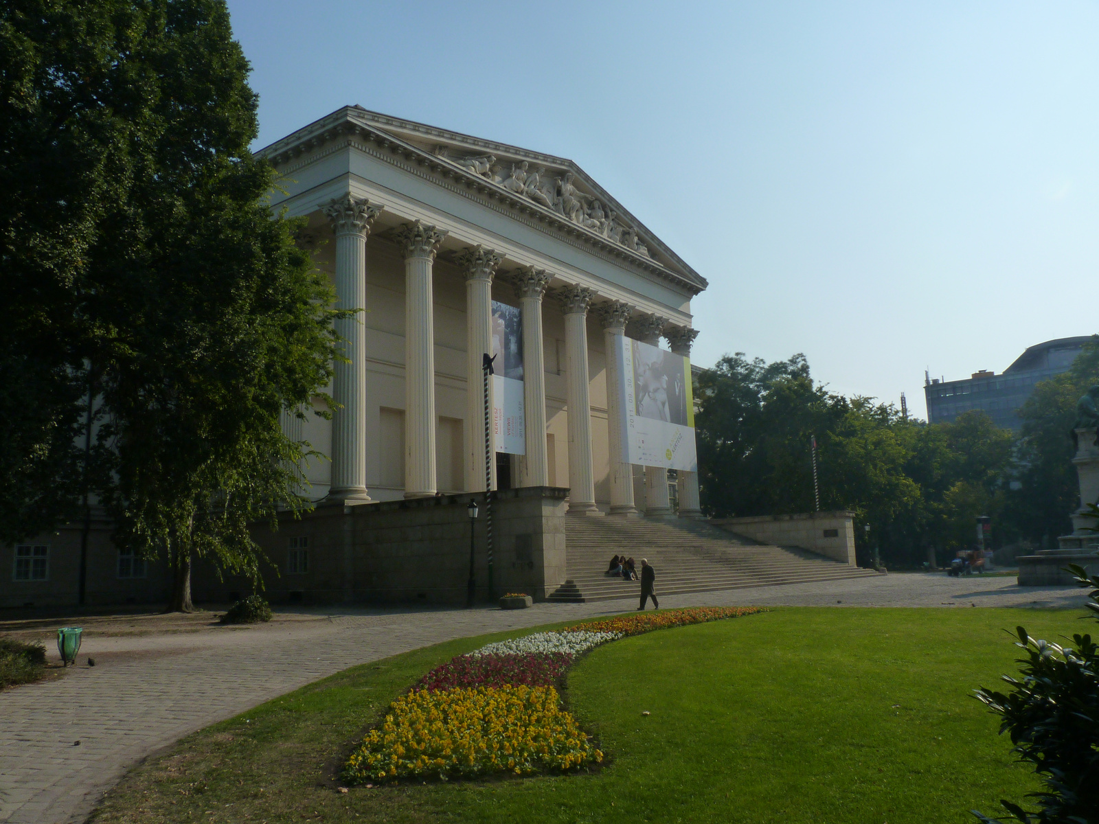 Magyar Nemzeti Múzeum (Budapest 8, Múzeum körút 14-16., Bródy Sándor utca 1., Múzeum utca 2., Pollack Mihály tér 2.) This is a photo of a monument in Hungary, Identifier: 945